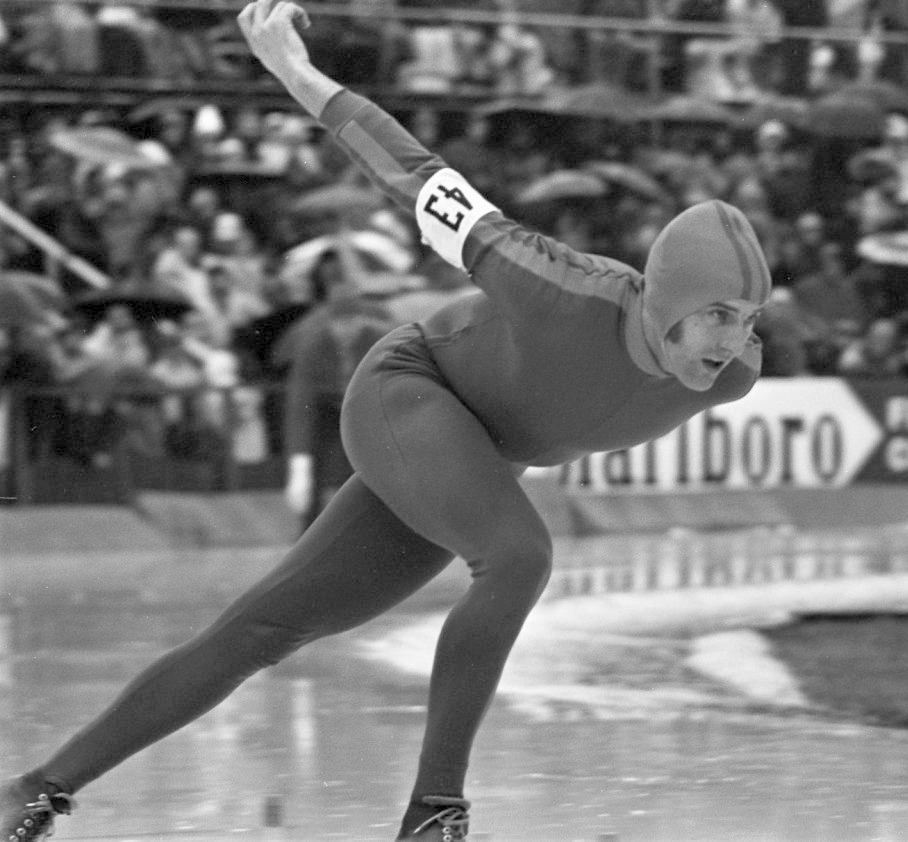 Wereldkampioenschappen schaatsen voor amateurs in Deventer Jappie van Dijk in aktie